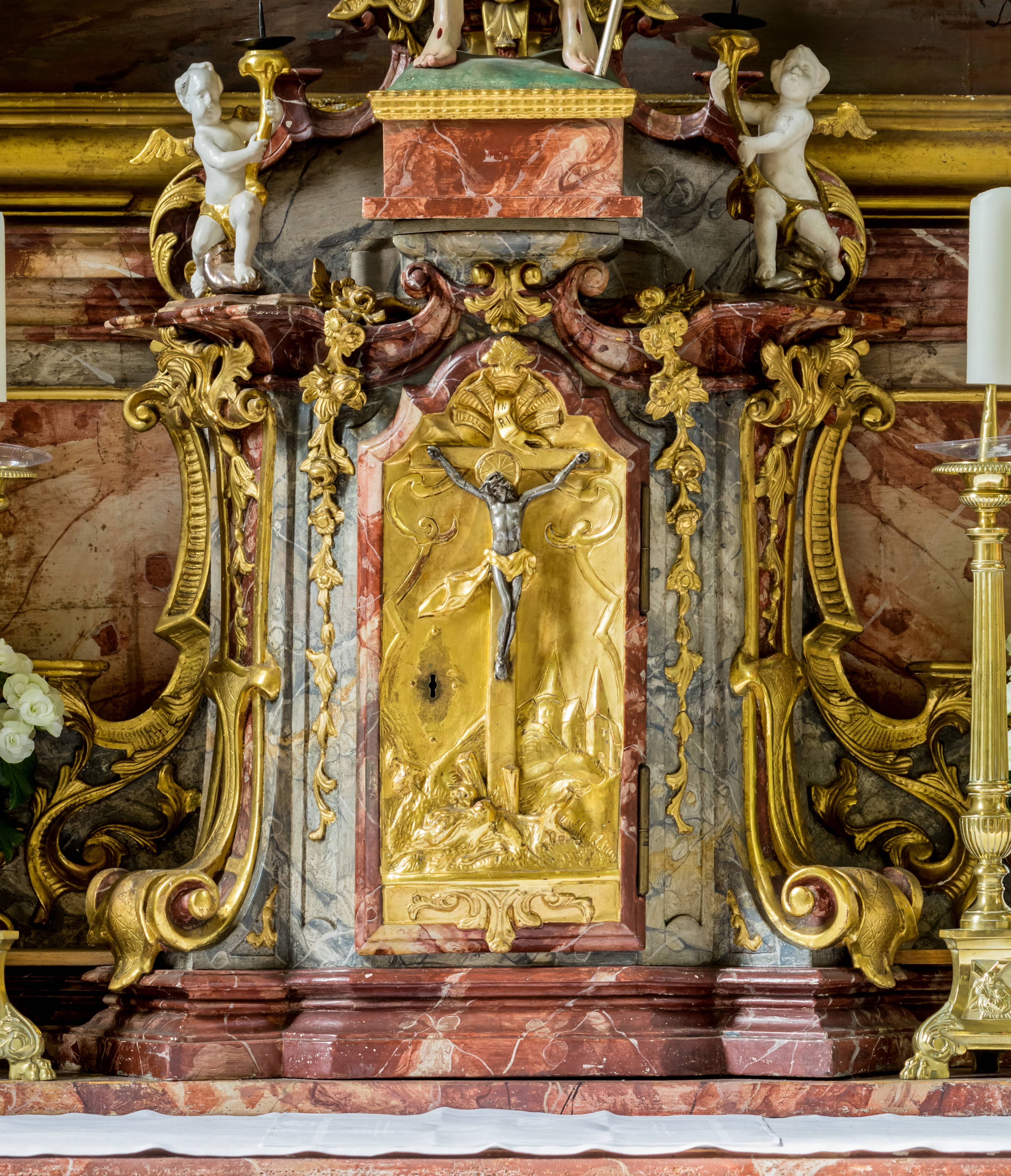 Bilder aus Freiburg von der Kirche St.Peter und Paul in Freiburg Kappel Der Tabernakel von Matthias Faller